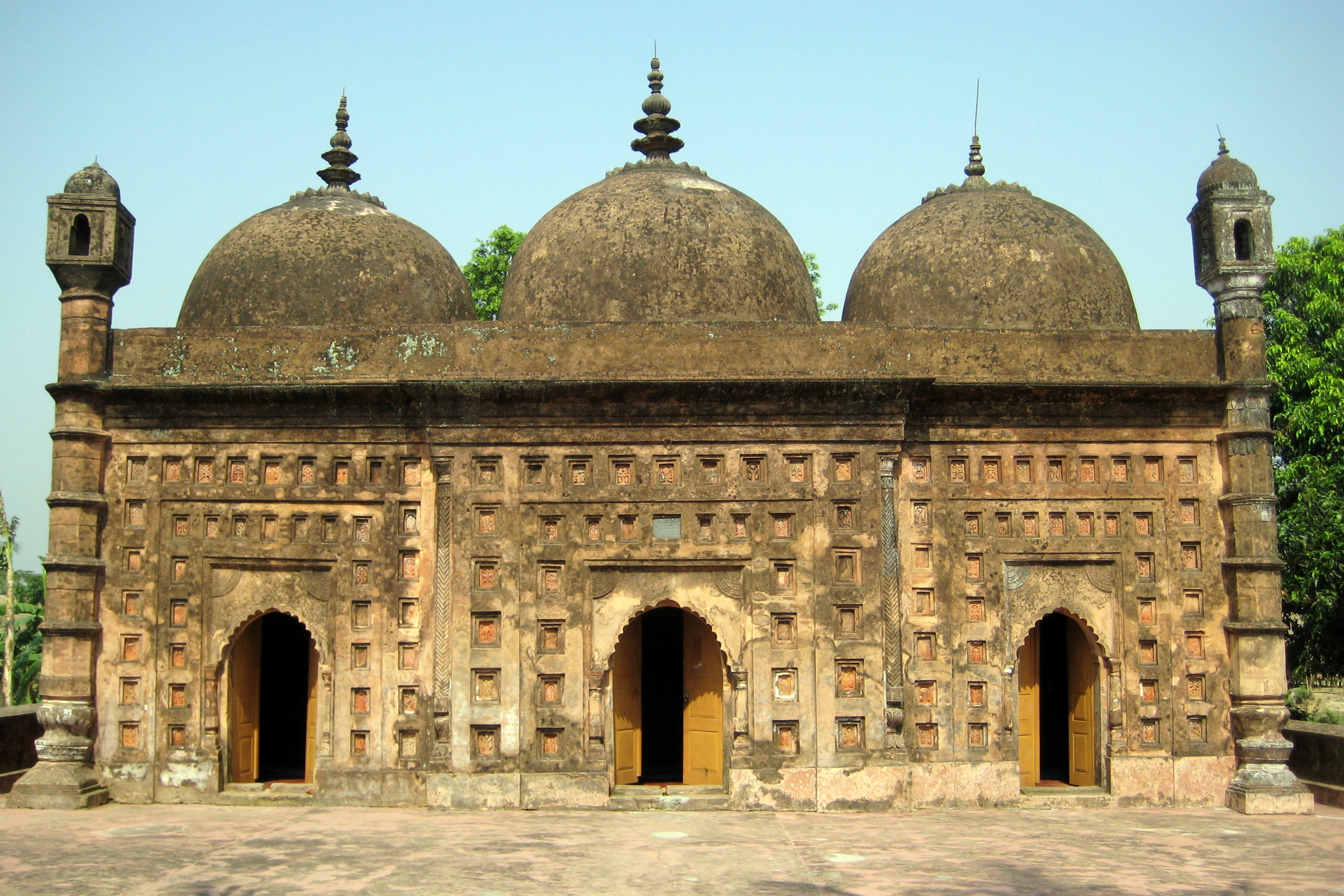 নয়াবাদ মসজিদ বাংলাদেশের দিনাজপুর শহর হতে প্রায় ২০ কিলোমিটার দূরে কাহারোল উপজেলার নয়াবাদ গ্রামে অবস্থিত মসজিদটির পাশ দিয়ে চলে গেছে ঢেপা নদী ১.১৫ বিঘা জমির উপর এই মসজিদটি তৈরী করা হয়েছে মসজিদের প্রবেশের প্রধান দরজার উপর স্থাপিত ফলক হতে জানা যায় এটি সম্রাট দ্বিতীয় শাহ আলমের রাজত্ব কালে ২ জৈষ্ঠ্য, ১২০০ বঙ্গাব্দে(ইংরেজী ১৭৯৩) নির্মান করা হয়। সেসময় জমিদার ছিলেন রাজা বৈদ্যনাথ। যিনি ছিলেন দিনাজপুর রাজ পরিবারের সর্বশেষ বংশধর। এলাকার অধিবাসীদের থেকে জানা যায় যে, ১৮ শতকের মাঝামাঝিতে কান্তনগর মন্দির তৈরীর কাজে আগত মুসলমান স্থপতি ও কর্মীরা এই মসজিদটি তৈরী করেন। তারা পশ্চিমের কোন দেশ থেকে এসে নয়াবাদে বসবাস শুরু করে এবং তাদের নিজেদের ব্যবহারের জন্য এই মসজিদটি তৈরী করে।